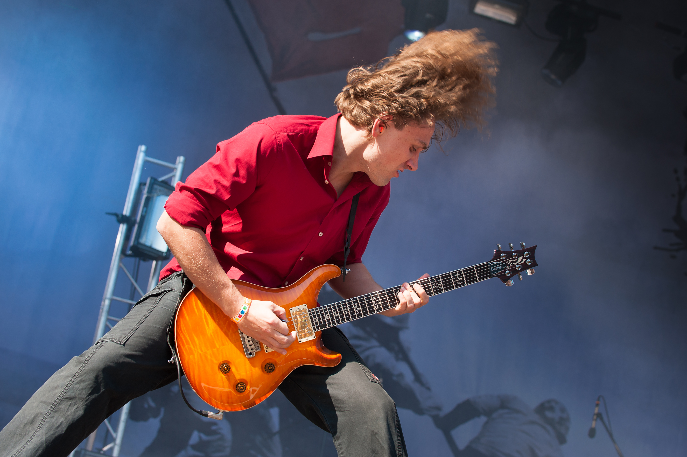 Heaven Shall Burn (deutsche Metalcore-Band) beim Rockfestival Rocco del Schlacko August, 2012. E-Gitarre, Maik Weichert